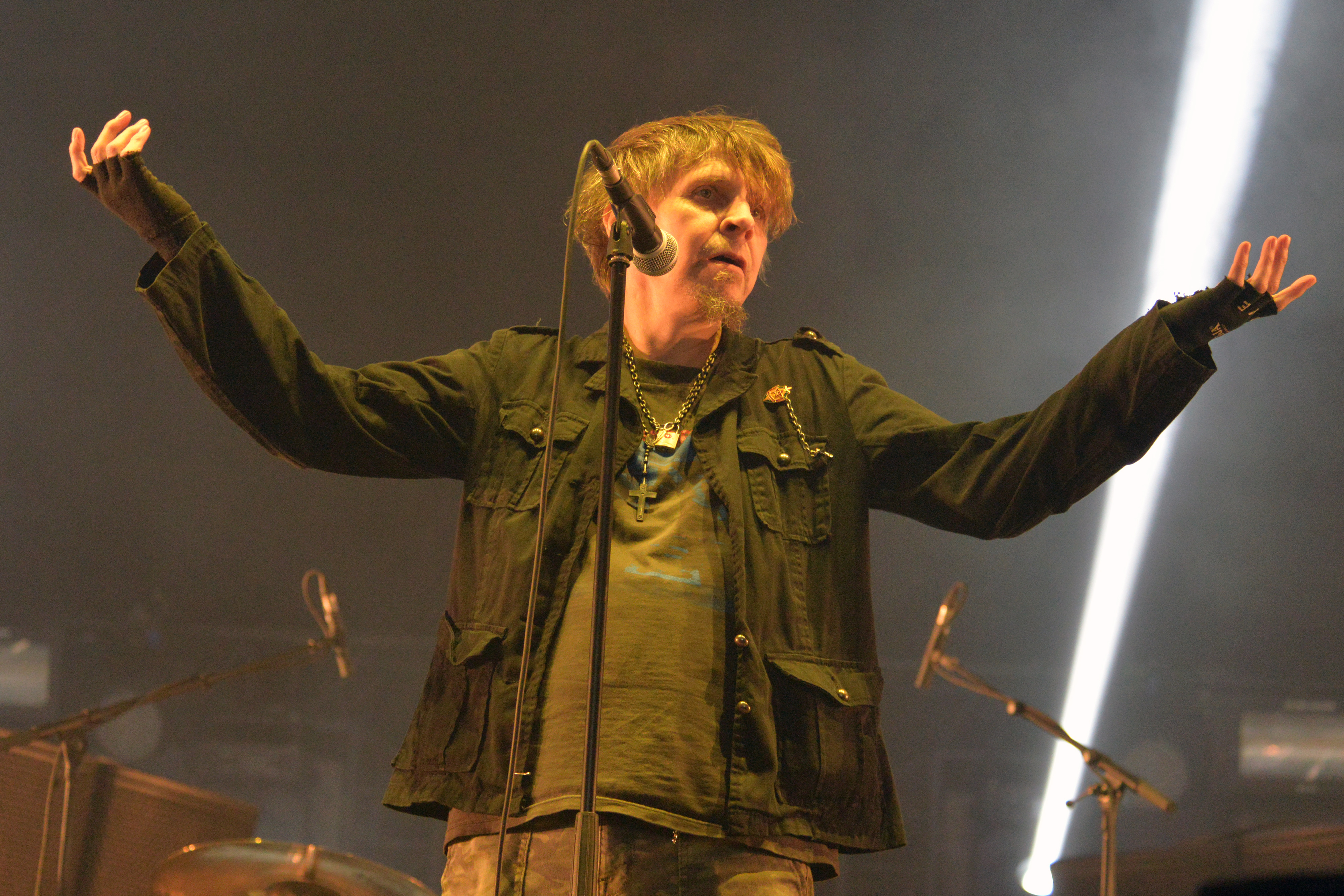 Concert du groupe américain EyeHateGod, Hellfest 2018.